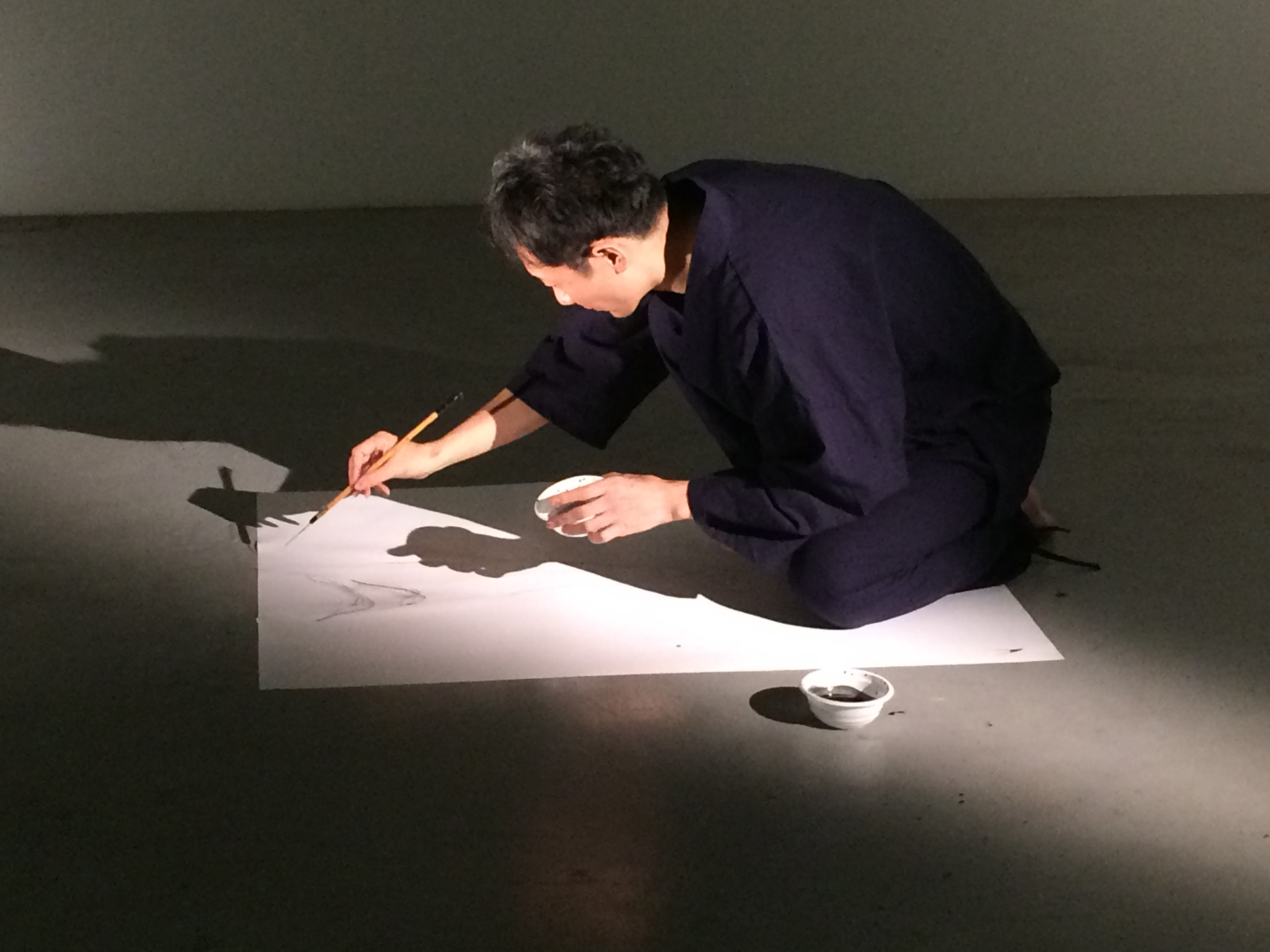 water制作風景。墨を流すのではなく、毛先が10本に満たない筆を使い、水の動きや流れを一本一本表現している